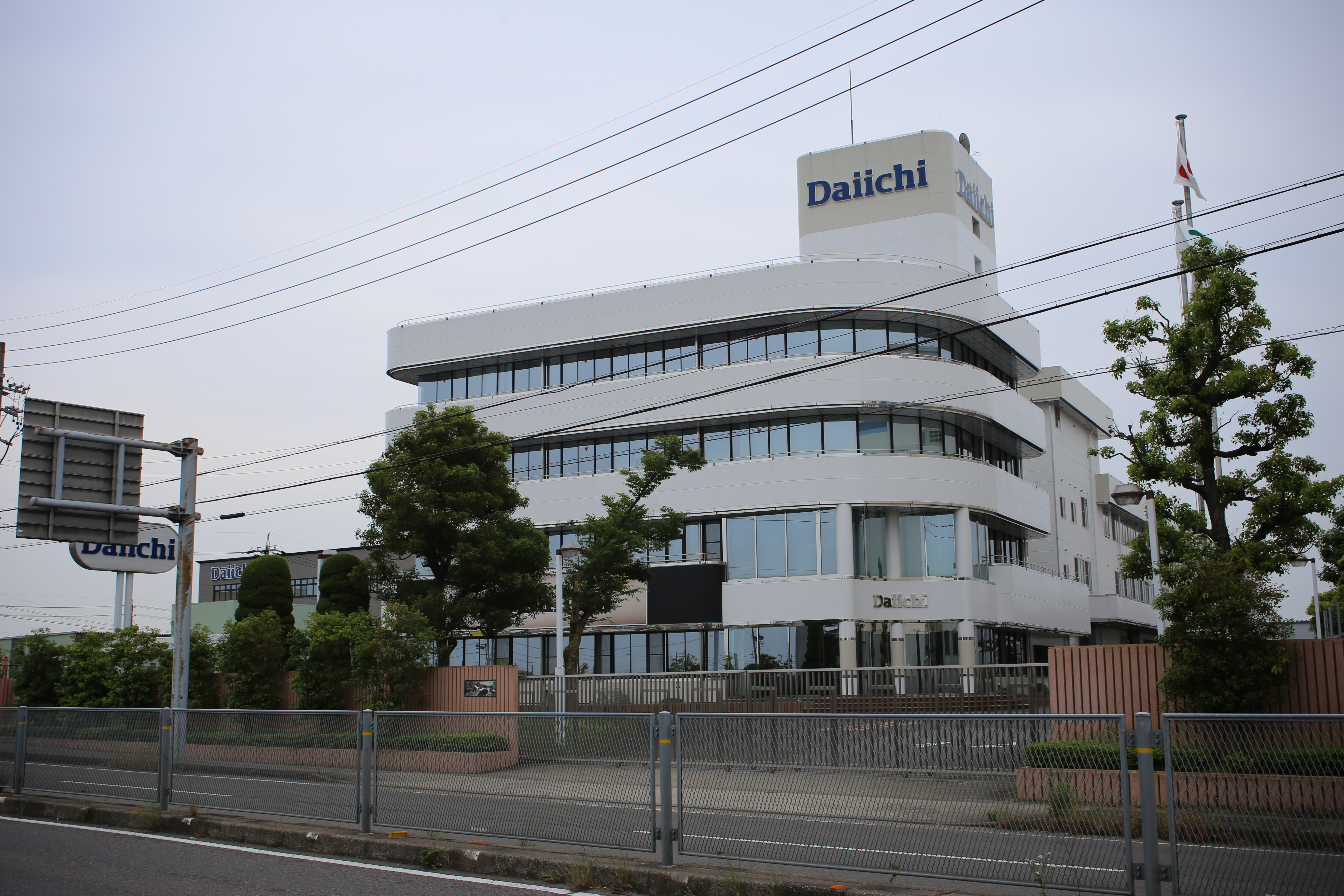 愛知県北名古屋市沖村西ノ川の大一商会本社を北側公道西側より撮影